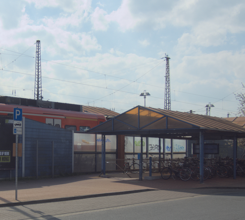 Der S-Bahn-Haltepunkt der "Eisenbahnerstadt" Letter. Der Bahnsteig jenseits der Lärmschutzwand ist durch den Tunnel erreichbar. Ortskundige benötigen hier kein Hinweisschild.